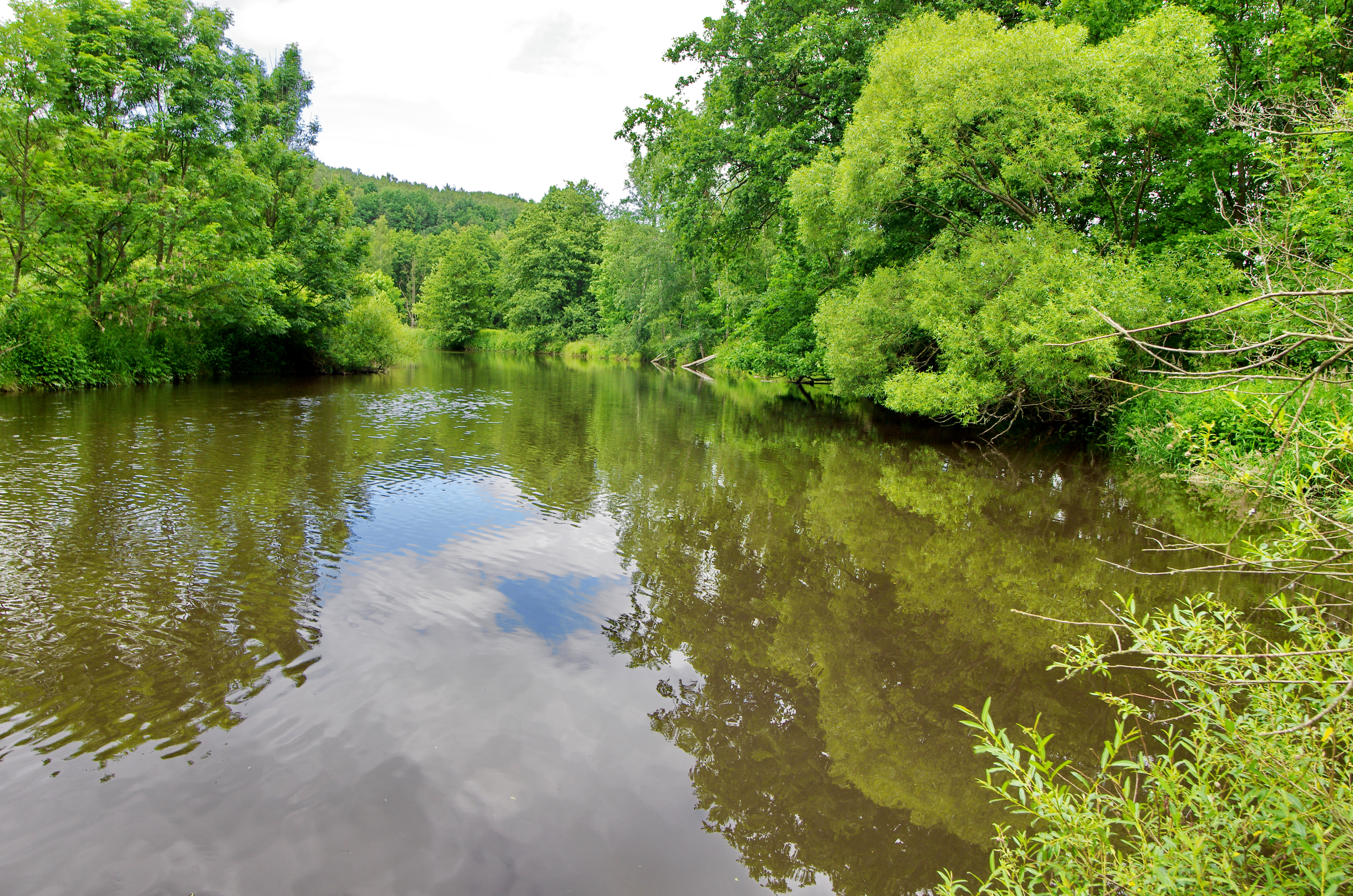 Přírodní rezervace Rathsam, okres Cheb